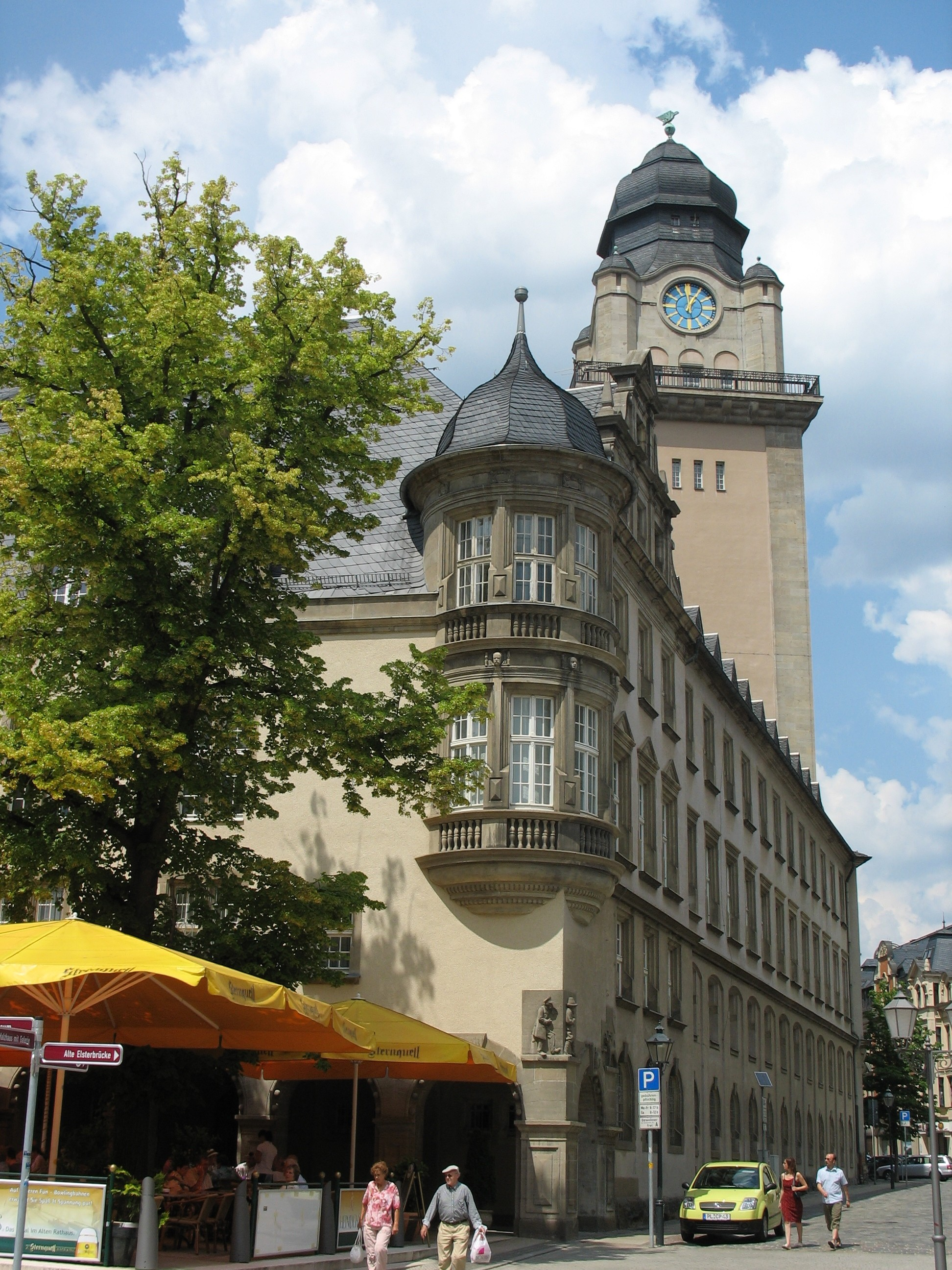 Turm und alte Fassade des Neuen Rathauses in Plauen